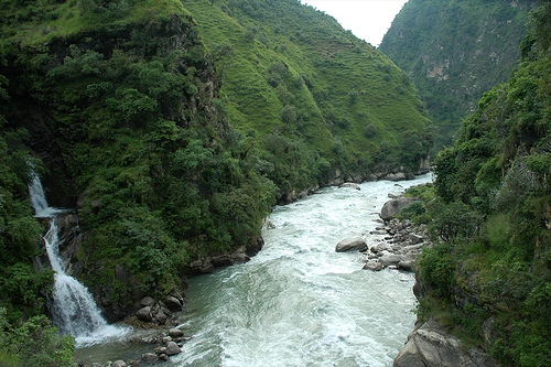 Karnali River, Nepal